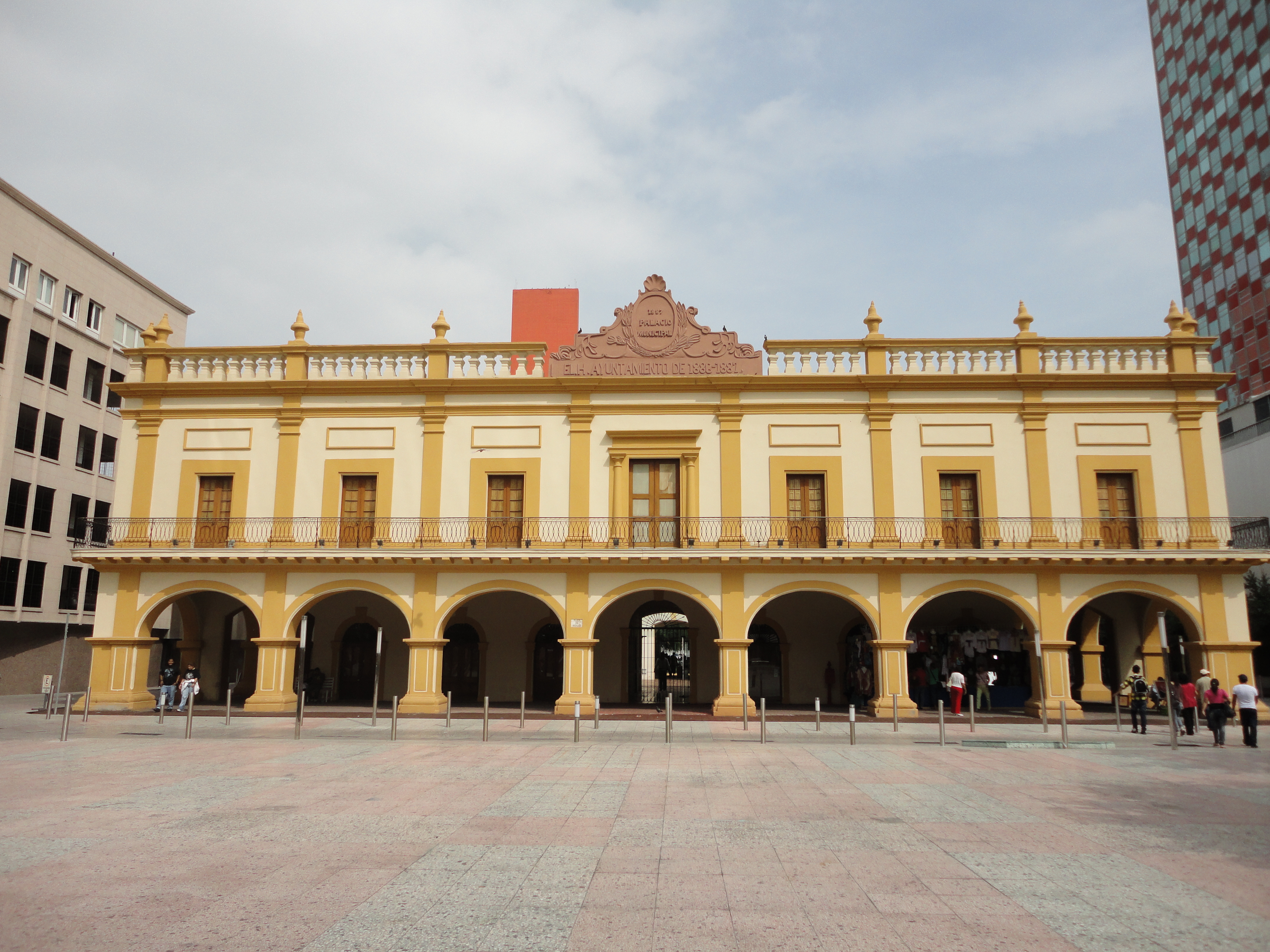 Tribunal Superior de Justicia